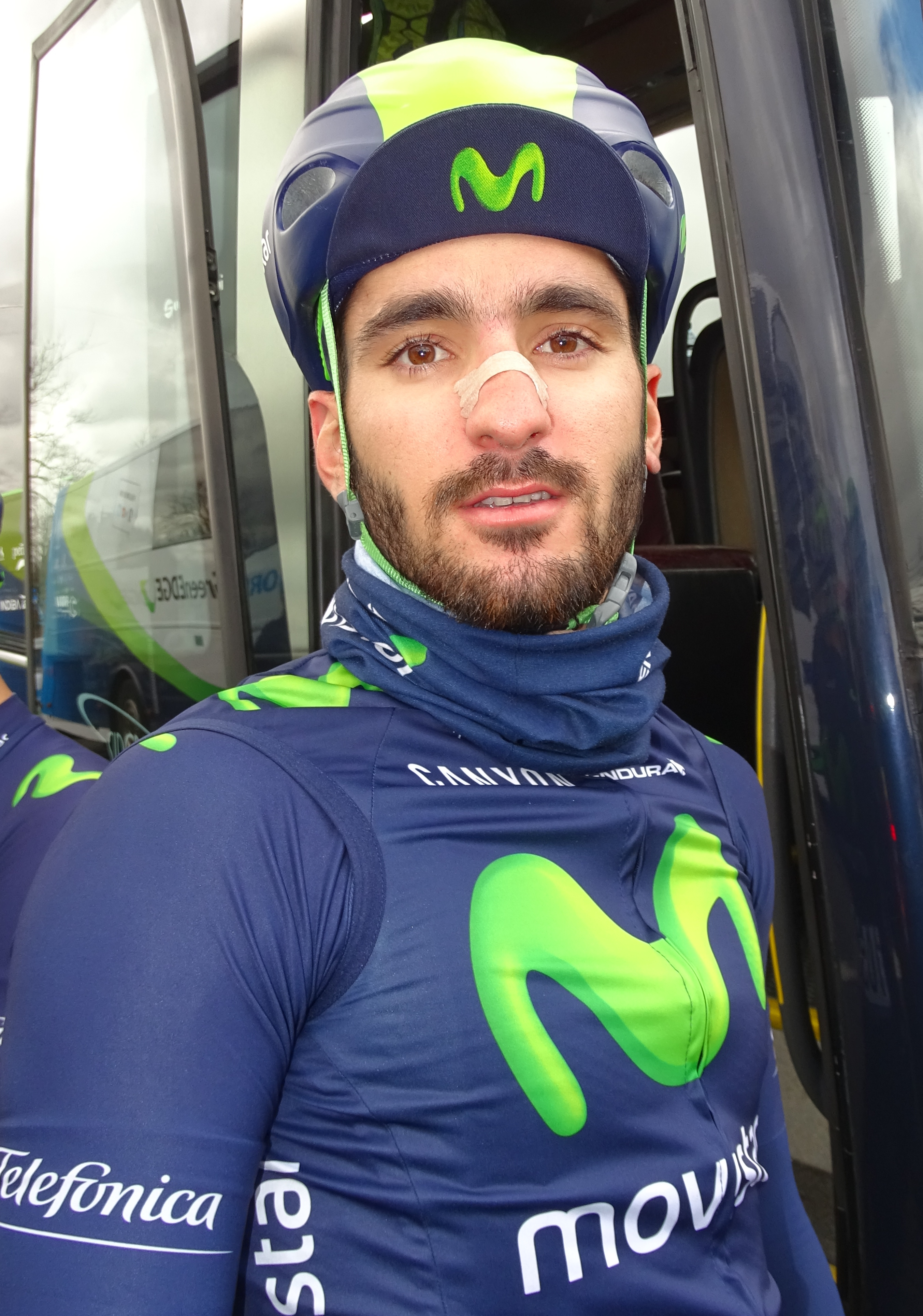 Reportage réalisé le mardi 31 mars à l'occasion de du départ de la première étape des Trois jours de La Panne 2015 à La Panne, Belgique.